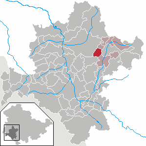 Springstille in Thuringia - District Schmalkalden-Meiningen